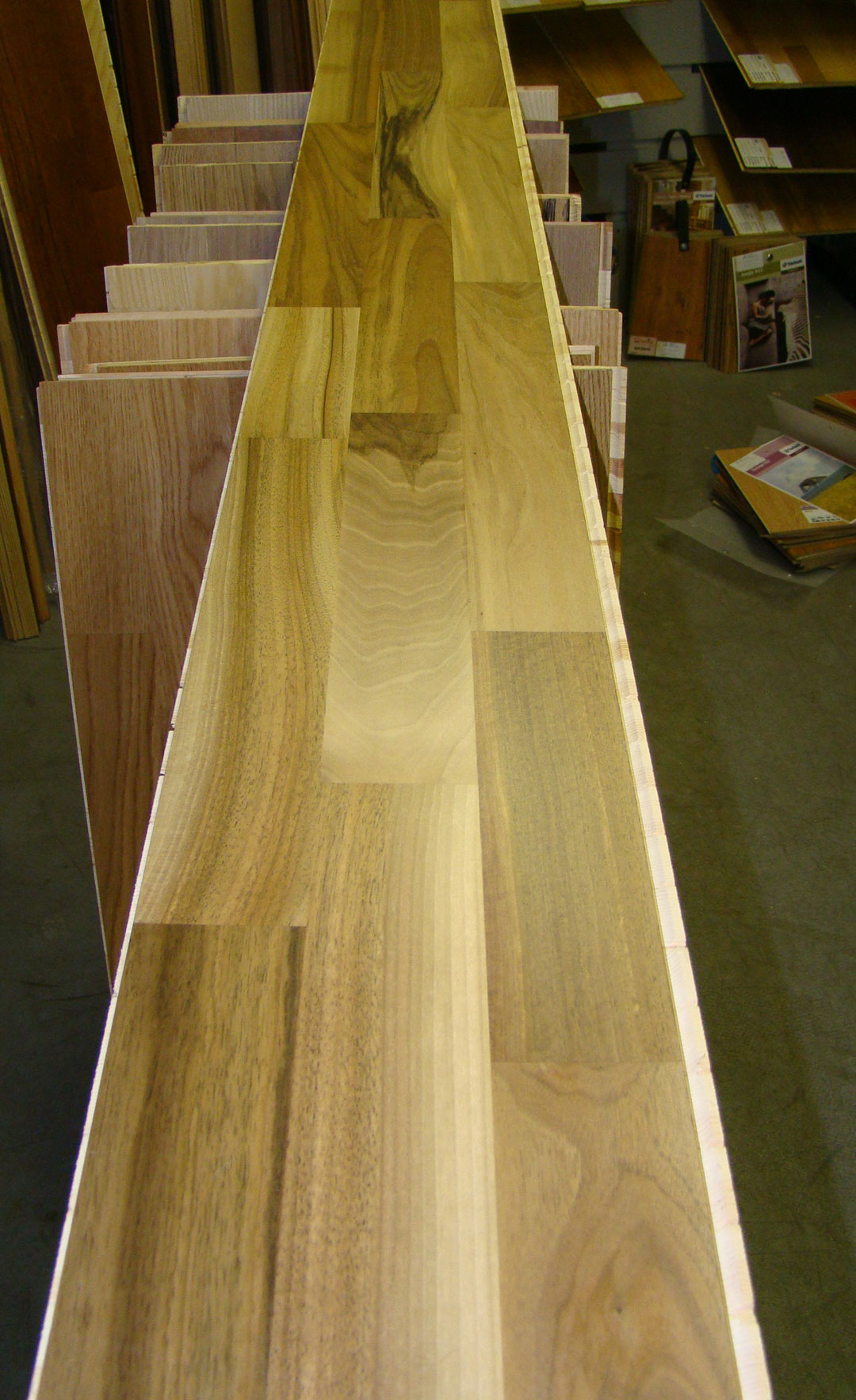 Трёхполосная паркетная доска из ореха.